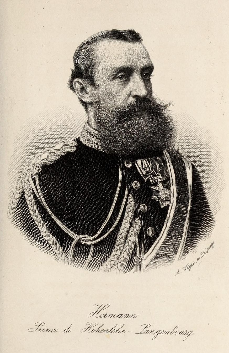 Hermann, Prince de Hohenlohe-Langenbourg, gestochen von A. Weger, 1882